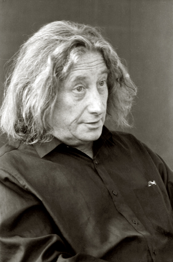 Vajda Mihály magyar filozófus, egyetemi tanár, a Magyar Tudományos Akadémia rendes tagja.